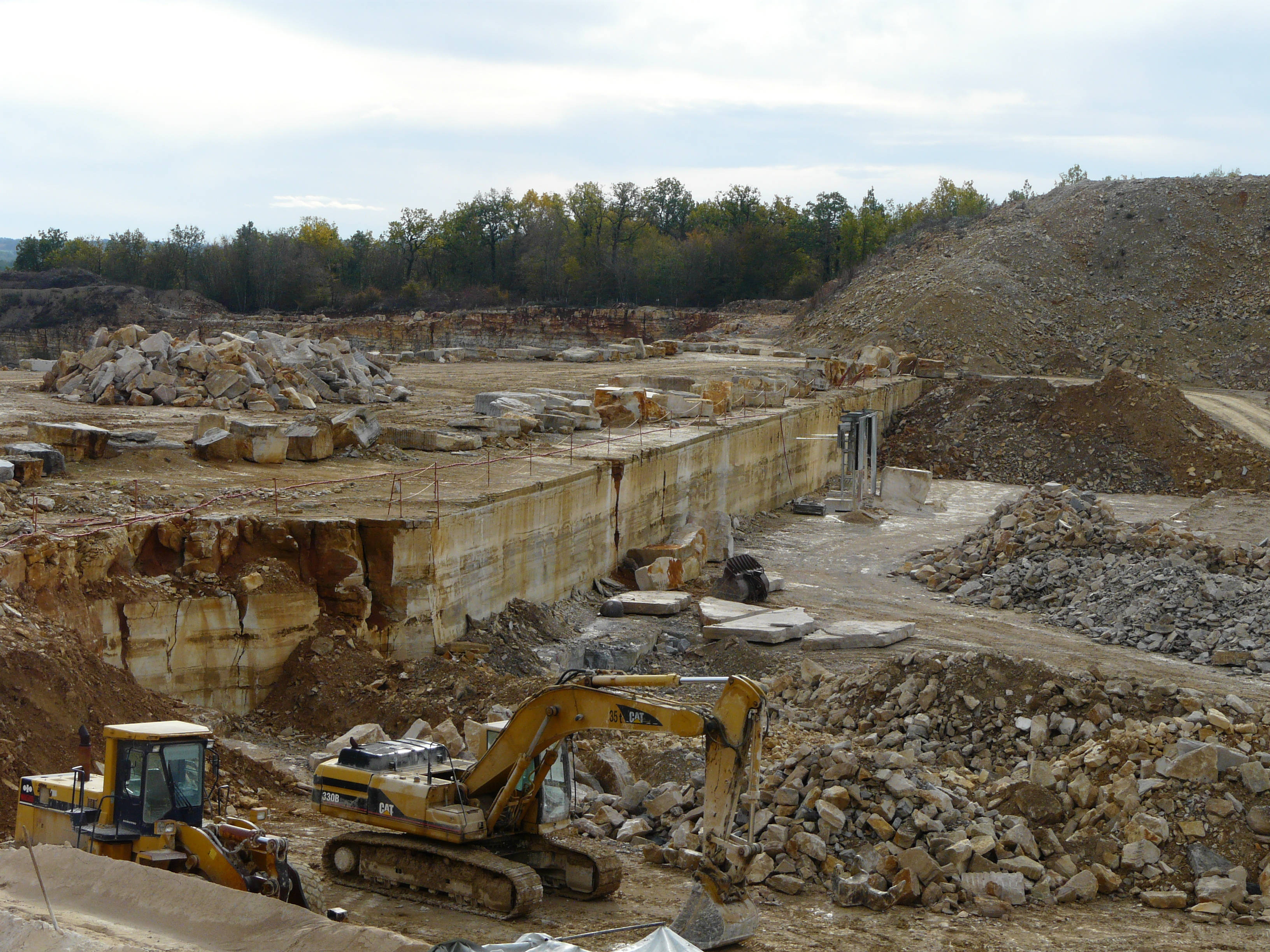 Carrière de calcaire au sud du lieu-dit Bontemps, Limeyrat, Dordogne, France.